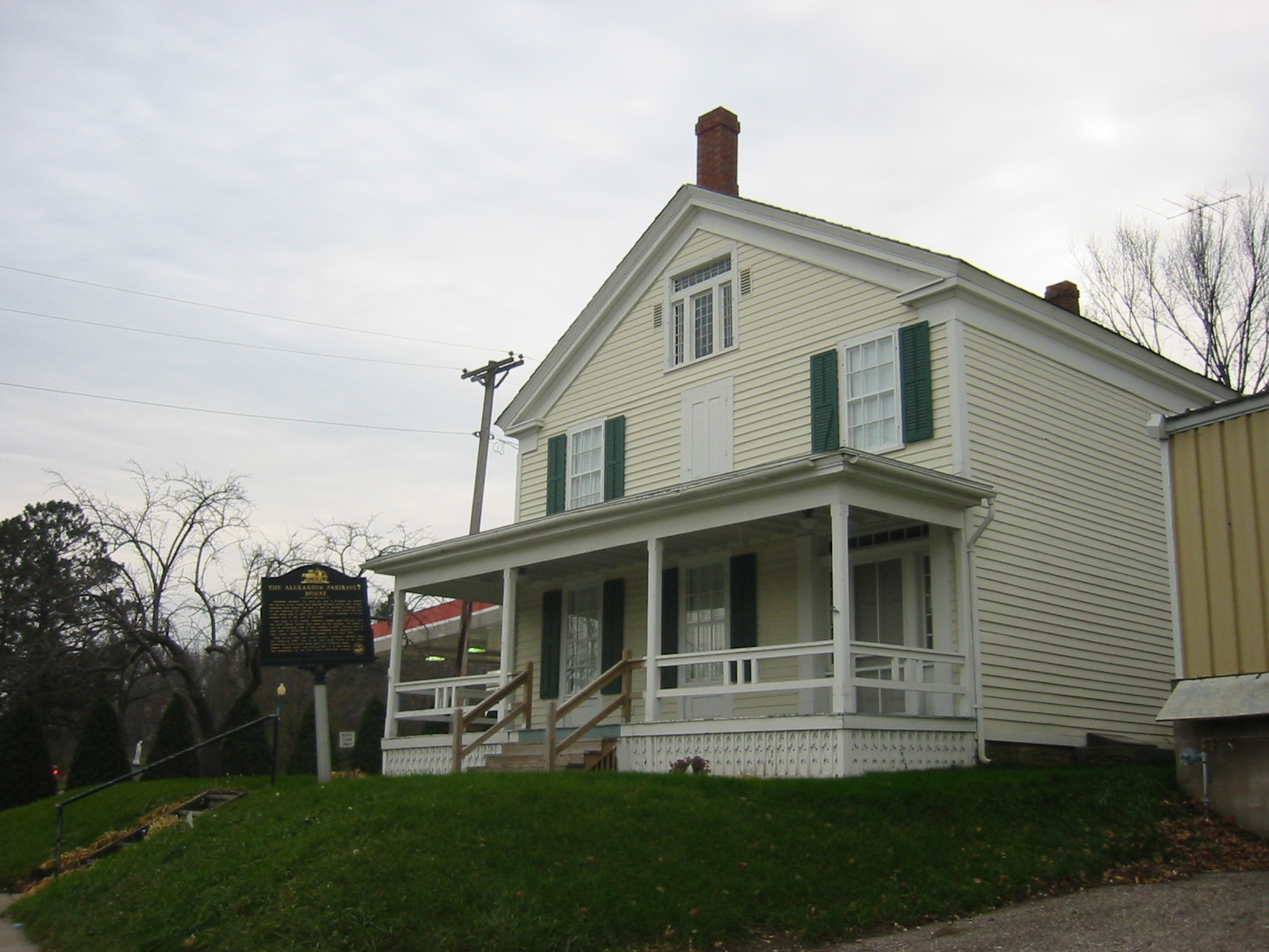 Alexander Faribault House in Faribault, Minnesota.